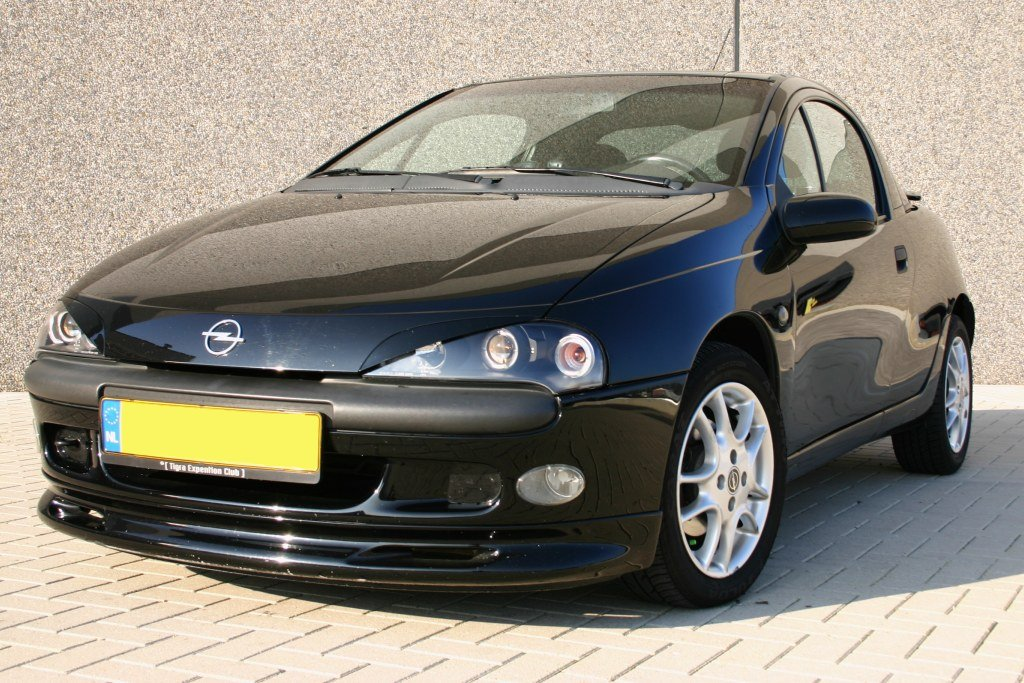 Deze foto, door mijzelf geschoten van mijn eigen auto; geef ik hiebij onder de GFDL licentie vrij.